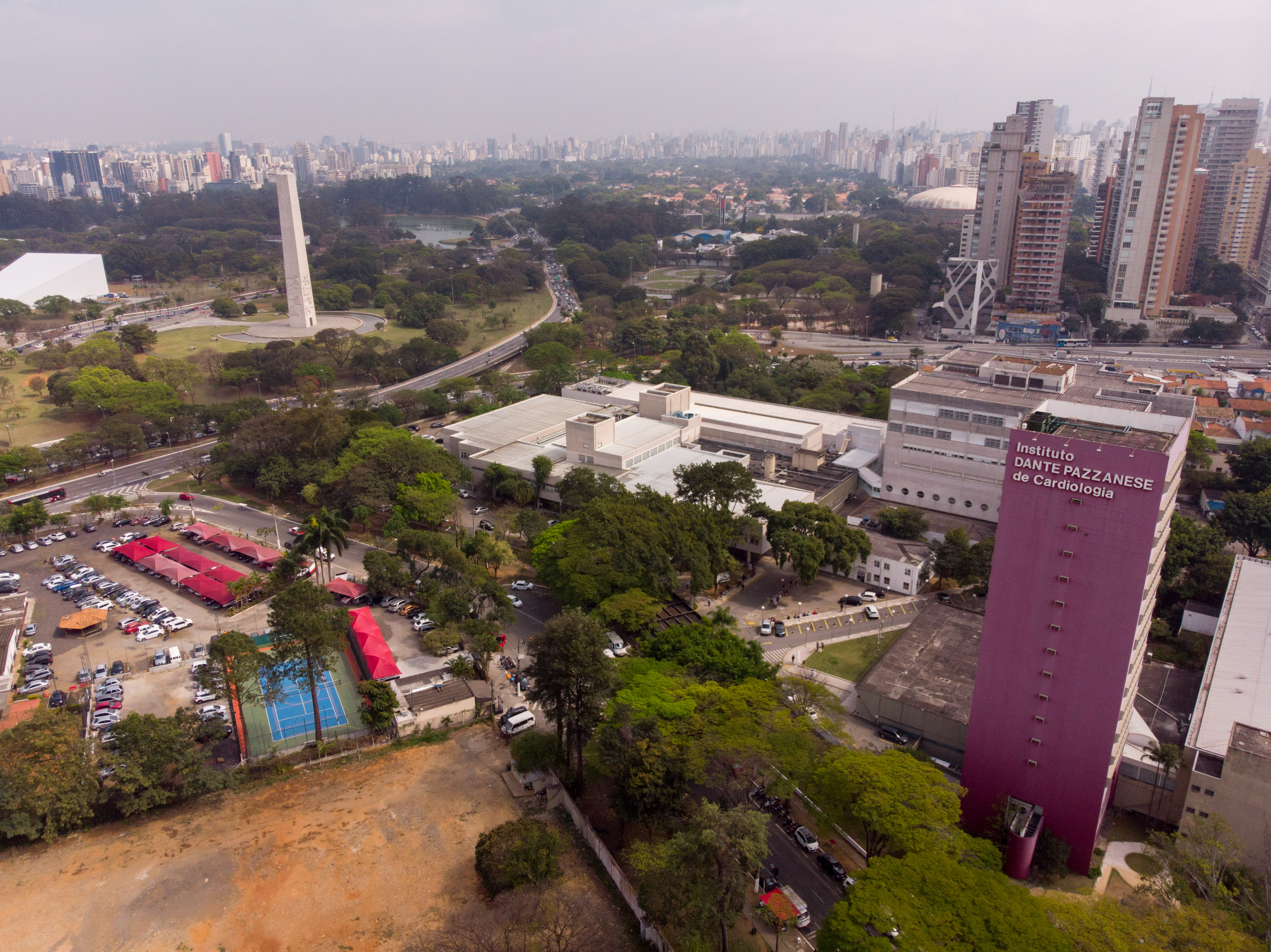 O governador Márcio França, Visita o Instituto Dante Pazzanese de Cardiologia .Local: São Paulo/SP Data: 13/09/2018.Foto: Governo do Estado de São Paulo